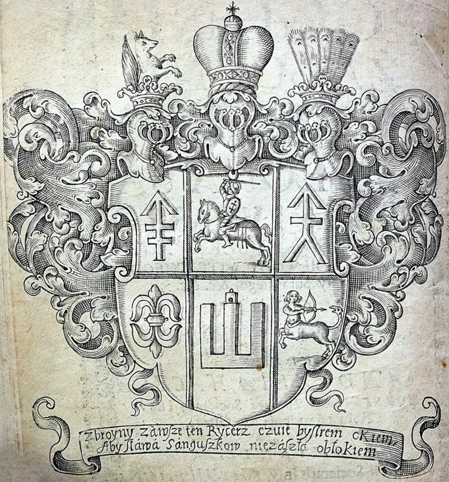 Беларуская (тарашкевіца): Вялікі герб князя Сымона Самуэля Сангушкі (Symon Samuel Sanguška) з Пагоняй (Pahonia) і Калюмнамі (Kalumny)